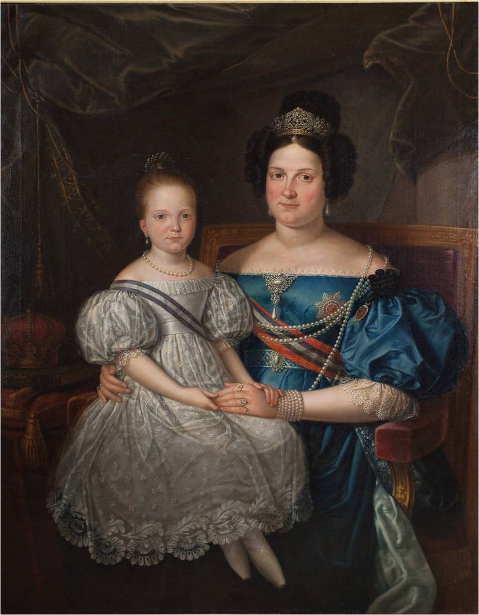 Retrato de la reina niña Isabel II de España (1830-1904), que era hija del rey Fernando VII, y de su madre, la reina regente María Cristina de Borbón-Dos Sicilias, que sostiene a su hija en sus brazos.